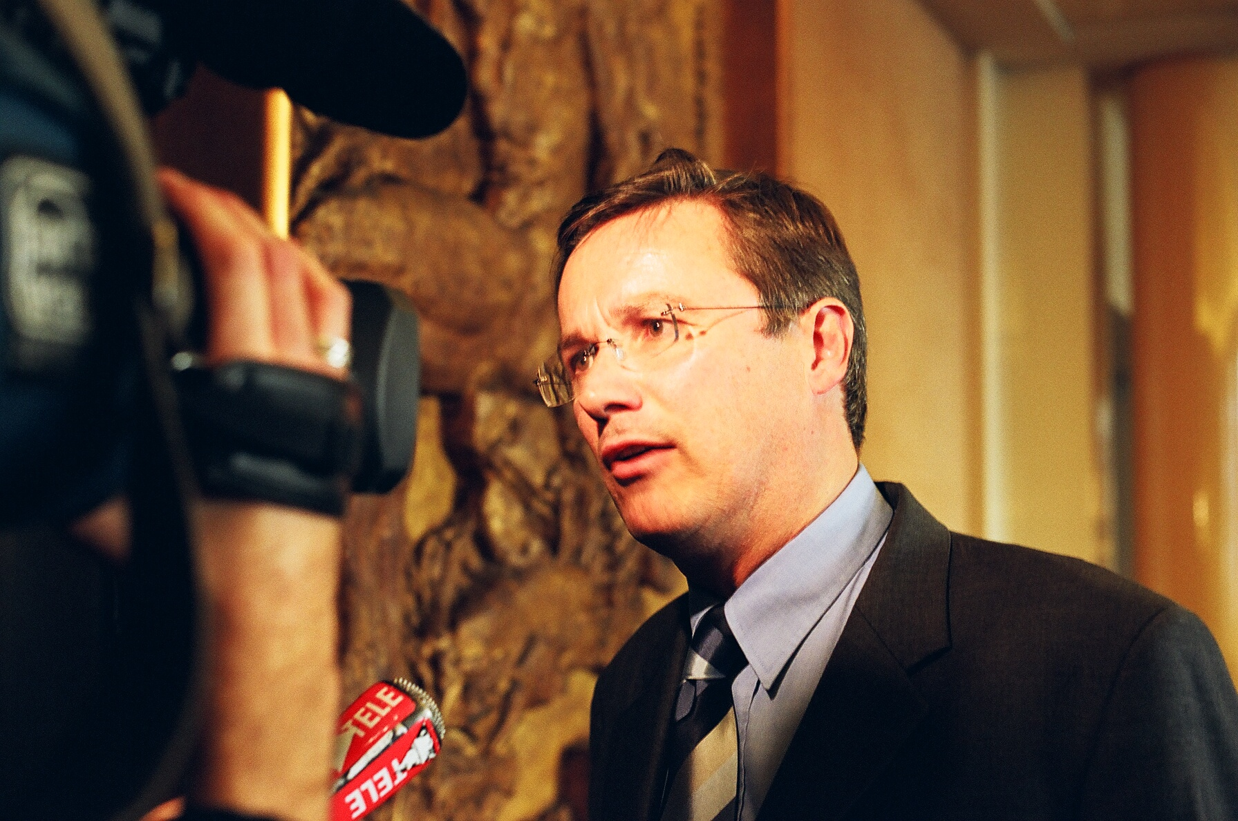 Nicolas Dupont-Aignan interviewé à Paris, lors du meeting de Debout la République